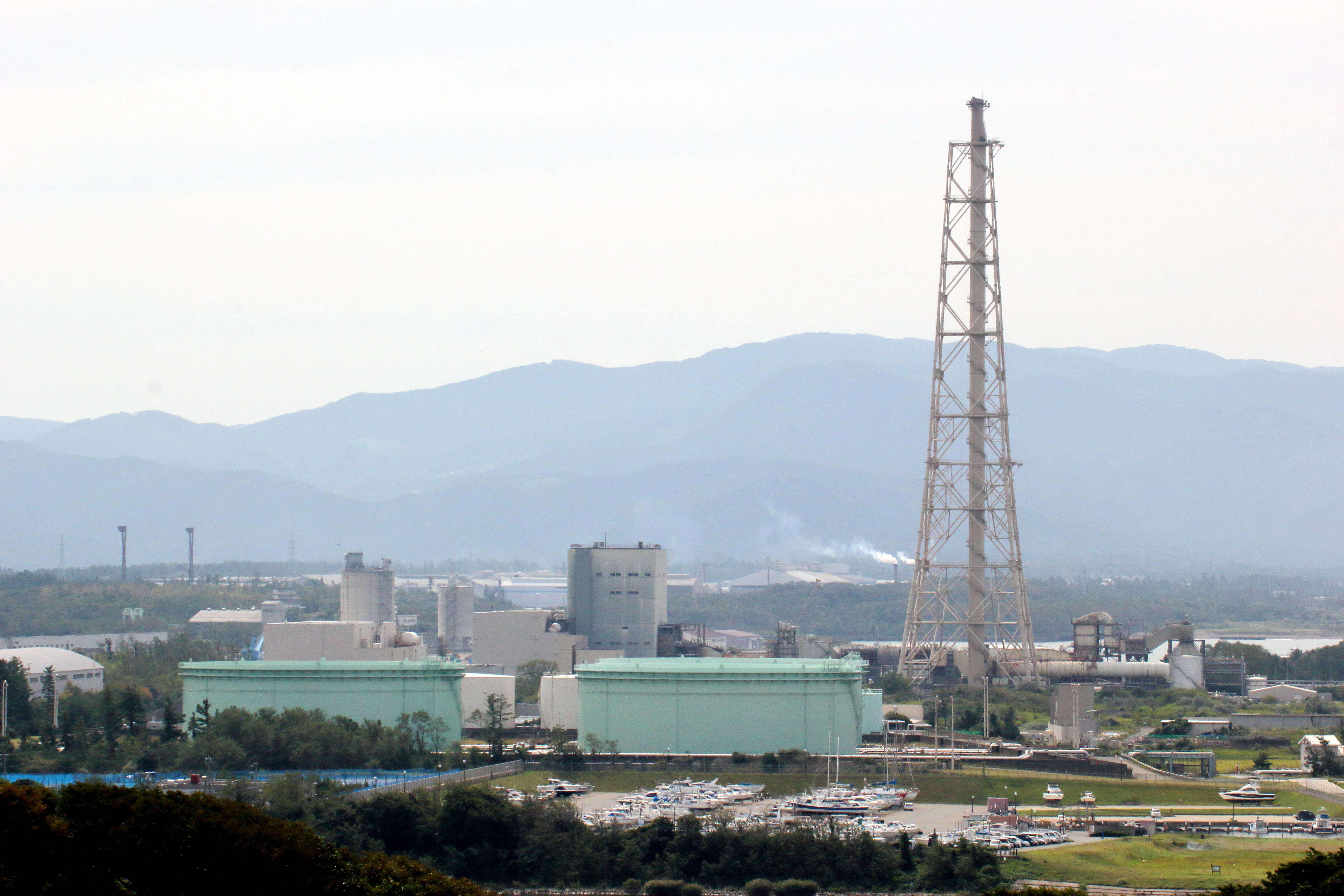 北陸電力 福井火力発電所 発電所北方の出世山古墳展望台より撮影